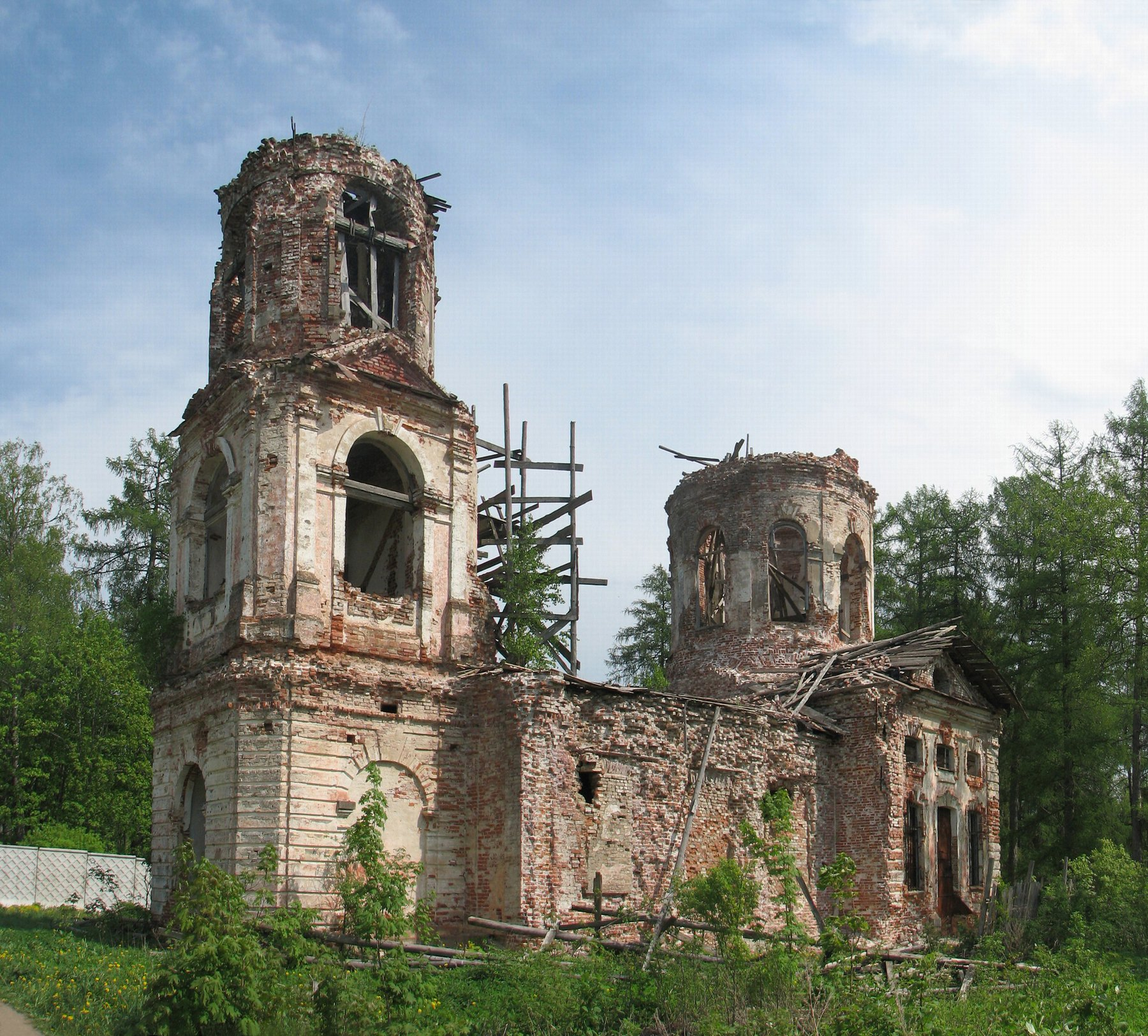 Руины церкви Владимирской иконы Божией Матери в Дылицах